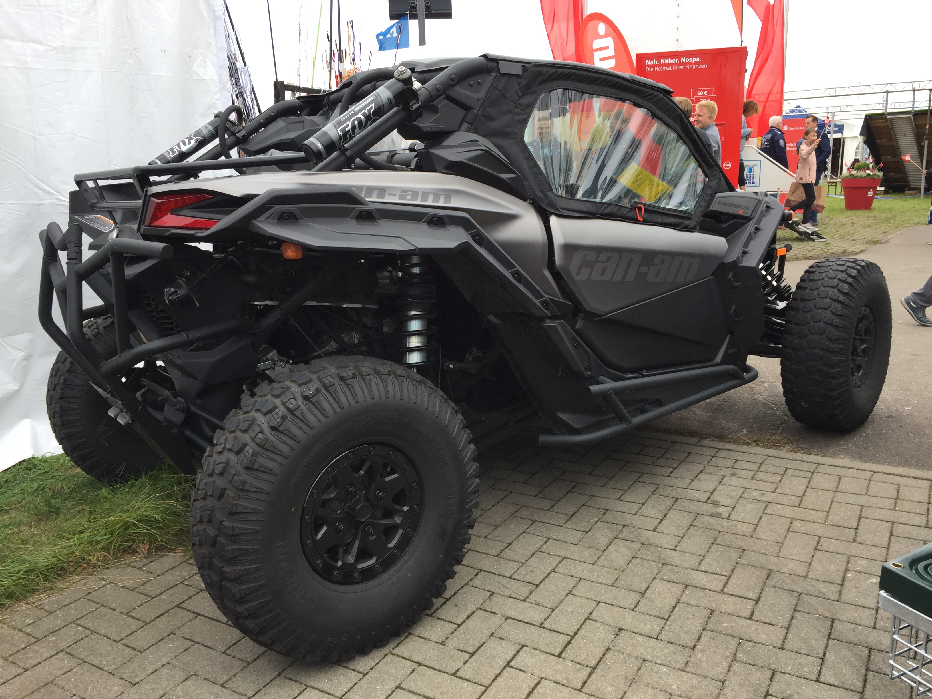 Can-Am "Maverick" Heckansicht